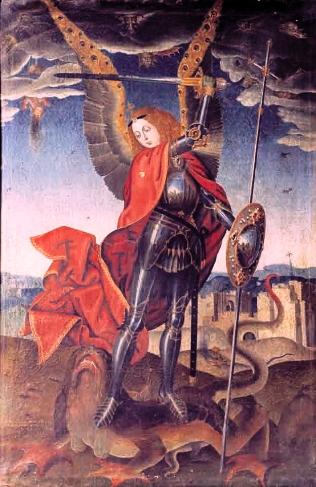 Esta obra, que representa a San Miguel Arcángel, es una copia de la obra idéntica conservada en el museo de la Catedral Vieja de Salamanca y ejecutada hacia 1504 por Juan de Flandes.